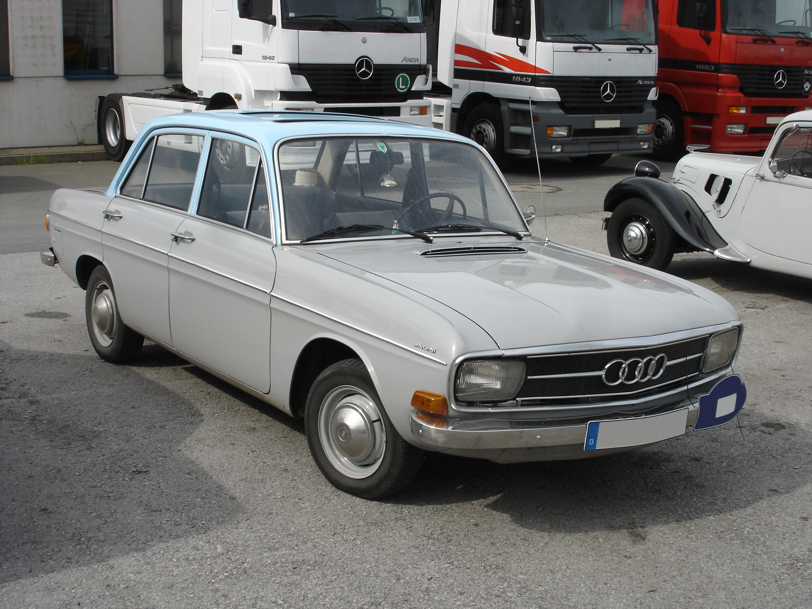 Audi 60 L Limousine